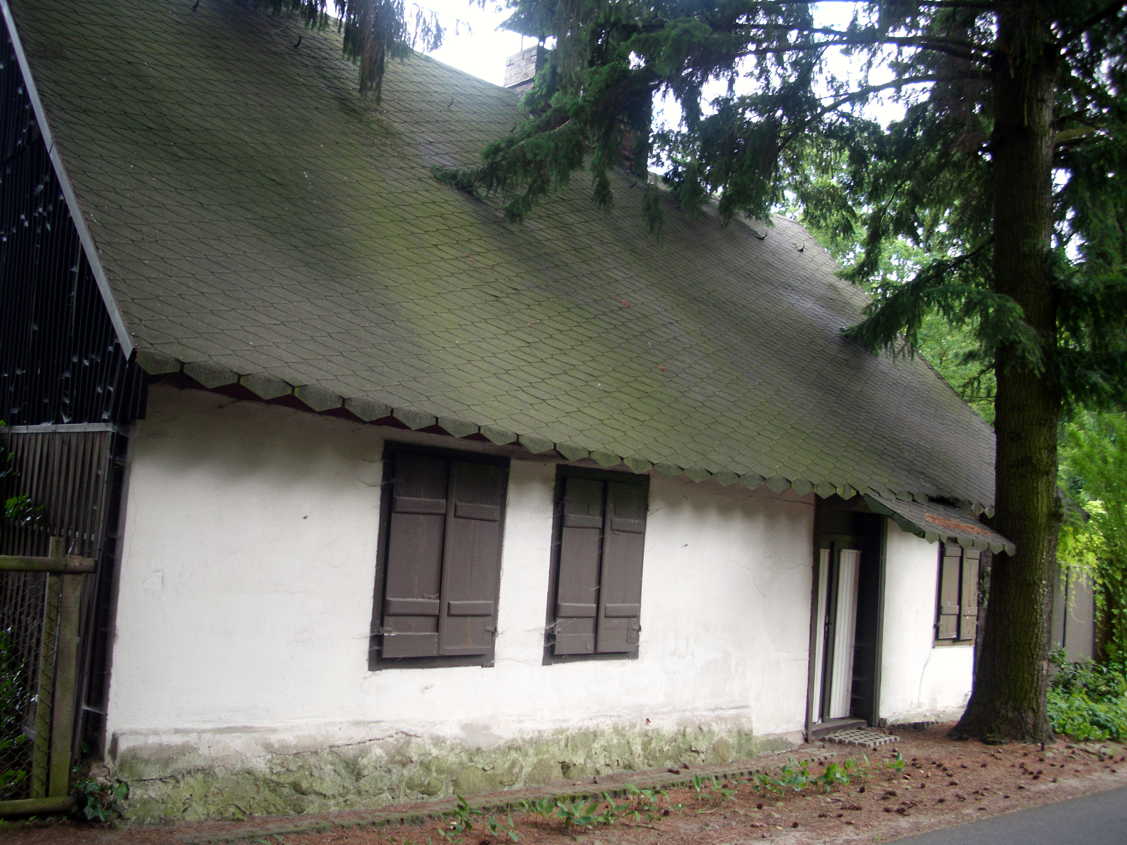 Kolonistenhaus, Müllrose, Forststraße 6